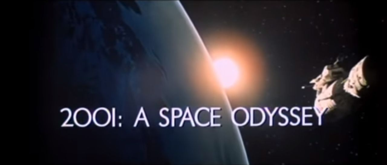 Filmkocka a 2001: Űrodüsszeia eredeti előzeteséből